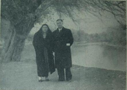 الاستاذ عبد القادر عياش باحث ومؤرخ وأديب وصحفي ومحام، عَشِقَ منطقة وادي الفرات وكرس حياته من أجلها، ومن أجل مدينته "دير الزور" التي أحبها وسرى حبها في دمه حتى أضحت جزءاً لا يتجزأ من كيانه.